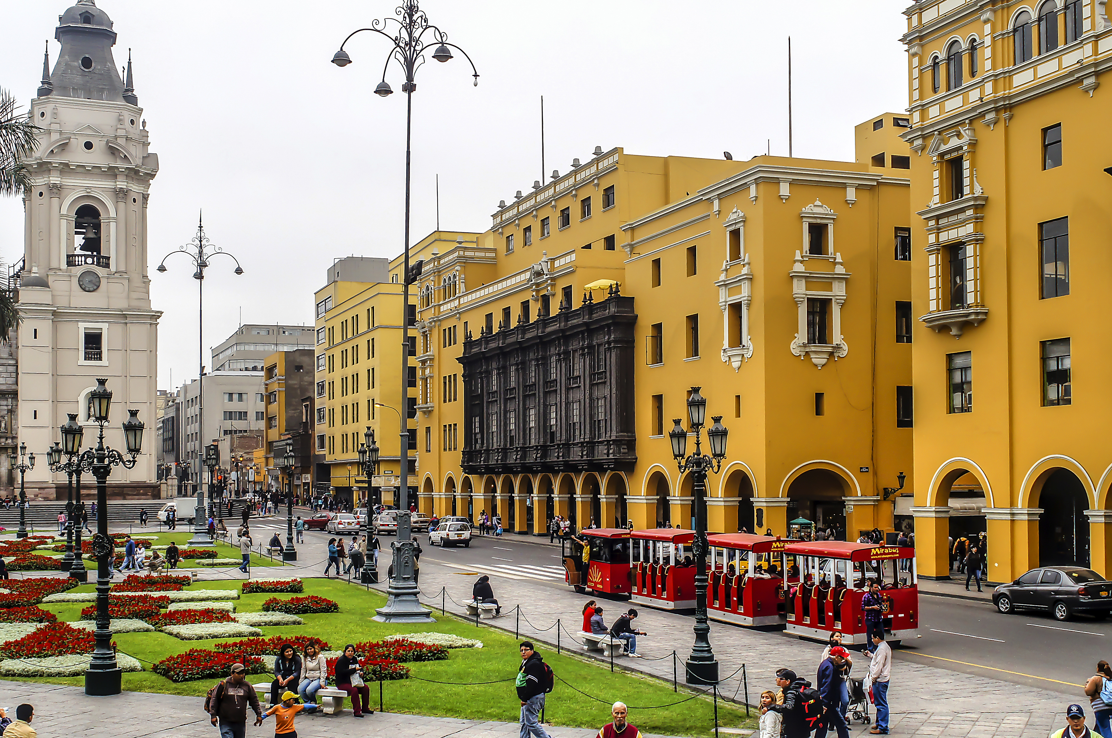 Basílica Catedral de Lima